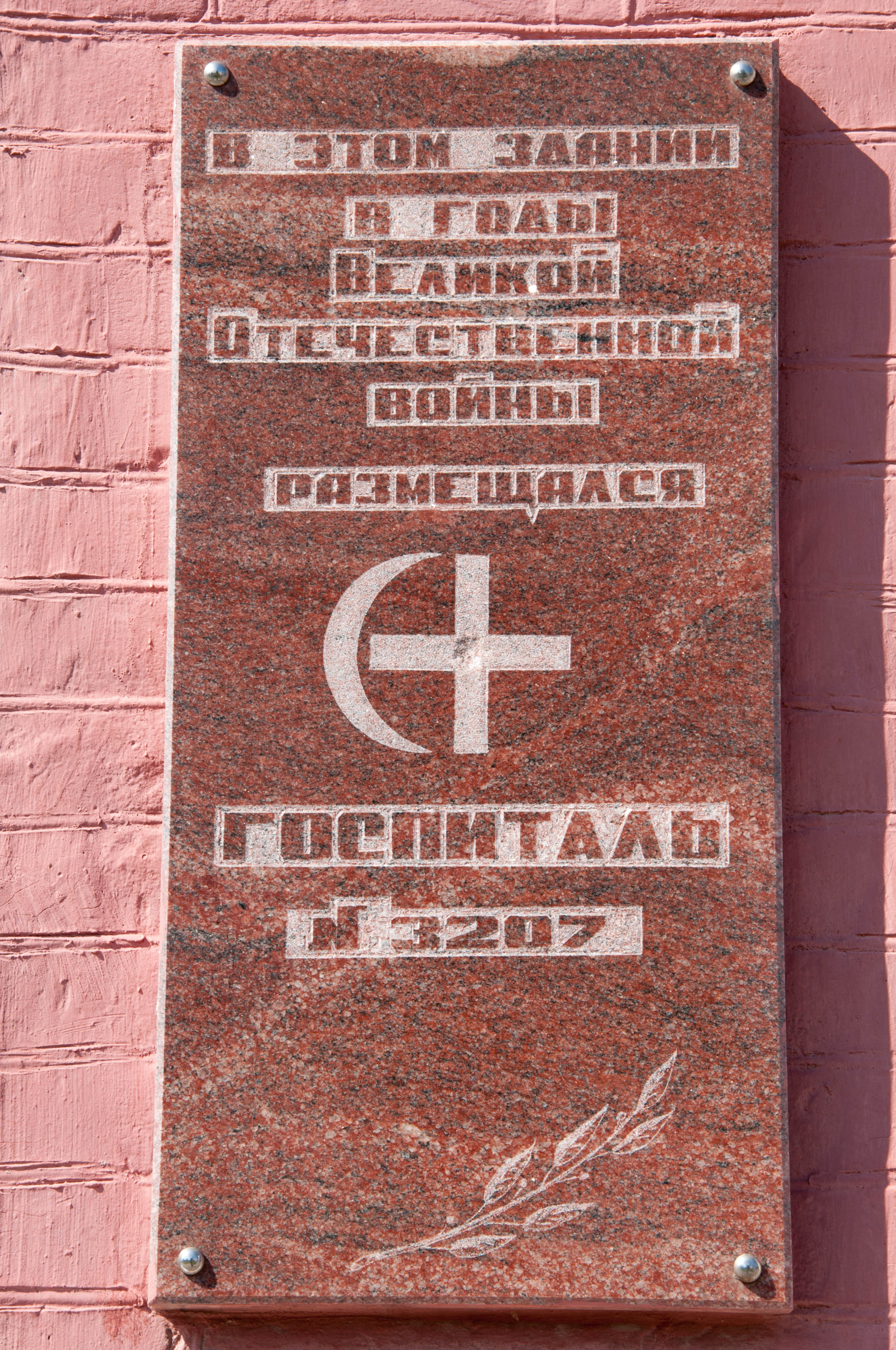 Здание мужской прогимназии (Ростовская область, Азов)